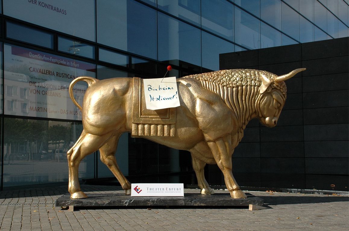 Stier Skulptur mit dem Motto der neuen Oper 2007/2008 "Bin beim Italiener" an das Motto der Neuen Oper im Jahr 2007/2008